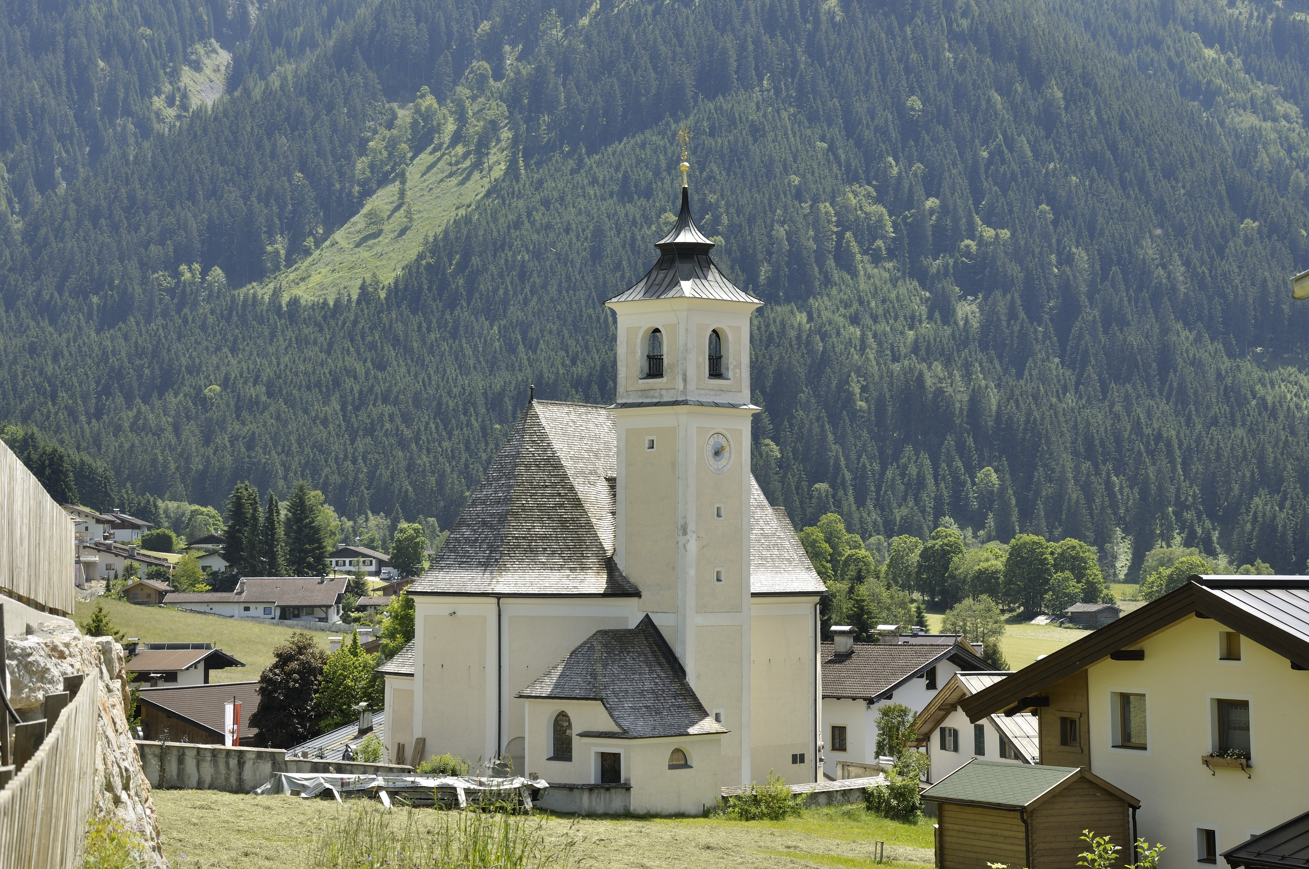 Expositurkirche Hl. Kreuz